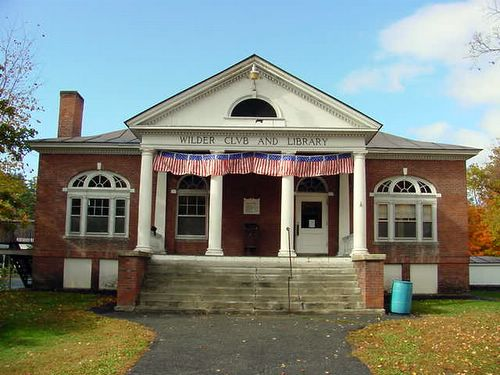 Wilder, VT